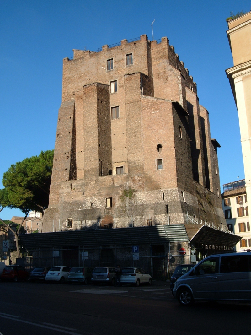 La Tor de' Conti vista da via Cavour. Roma, rione Monti.